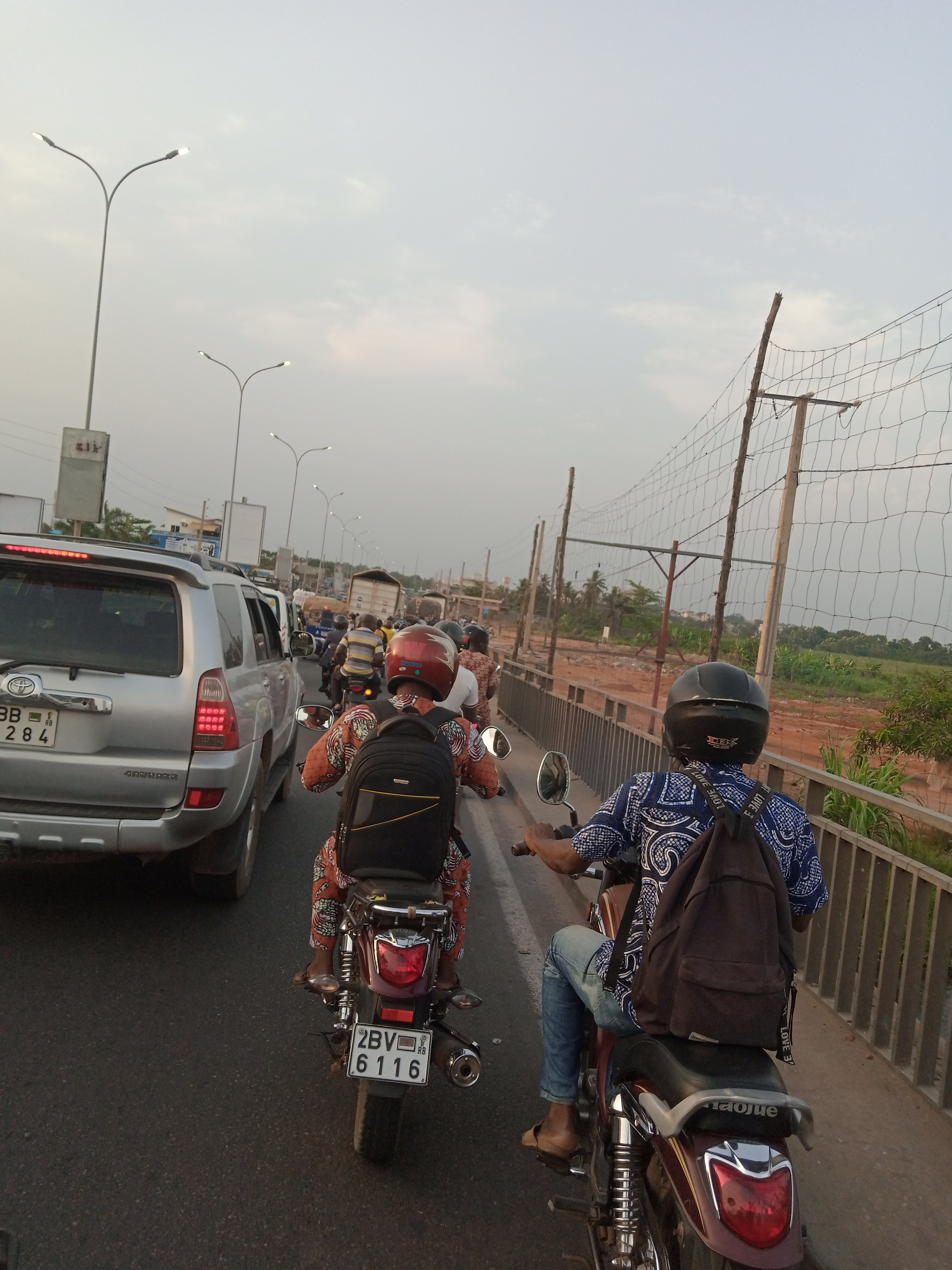 le pont de Togoudo This is an image with the theme "Africa on the Move or Transport" from: Benin